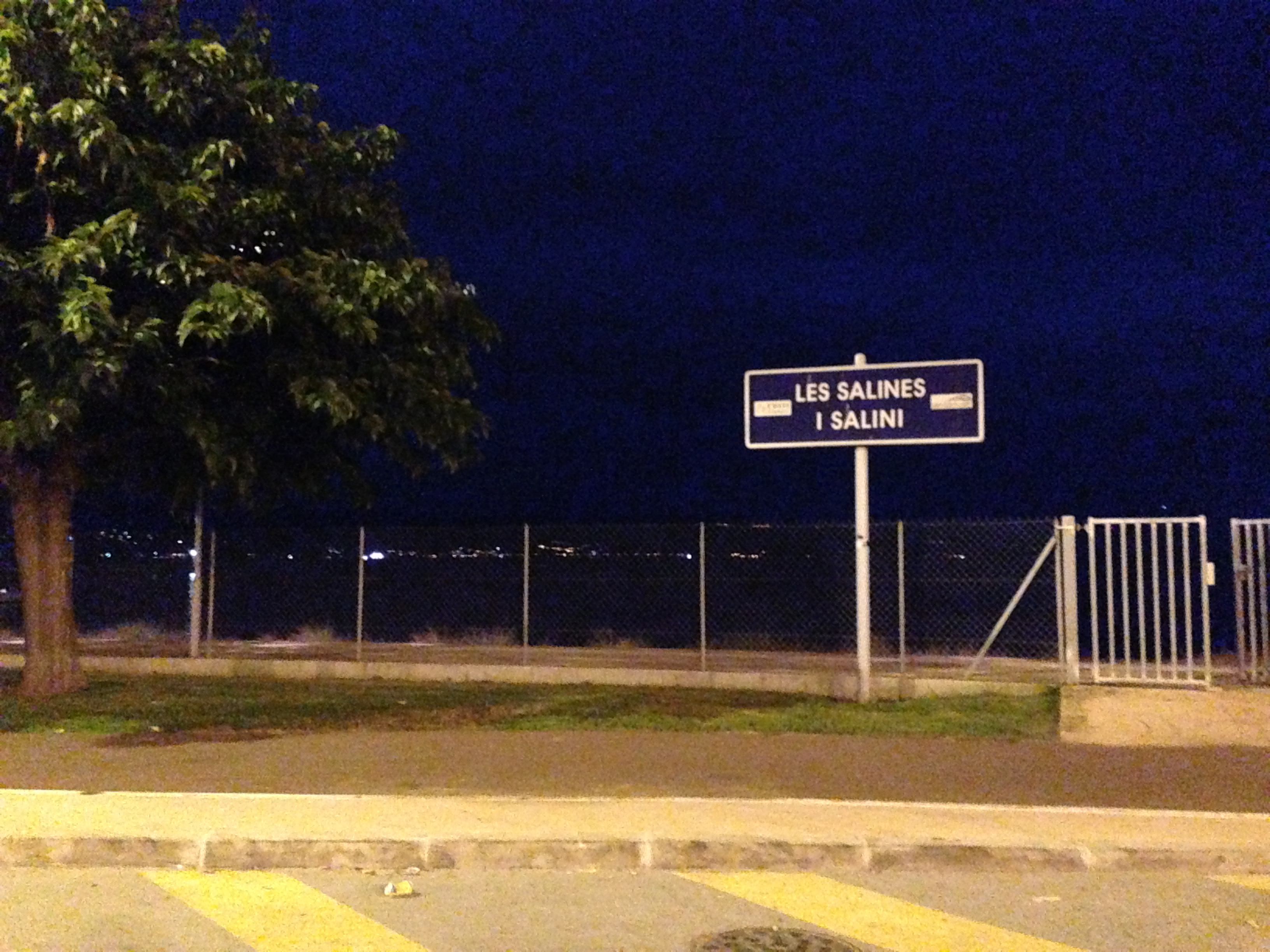 Le panneau de la gare des Salines